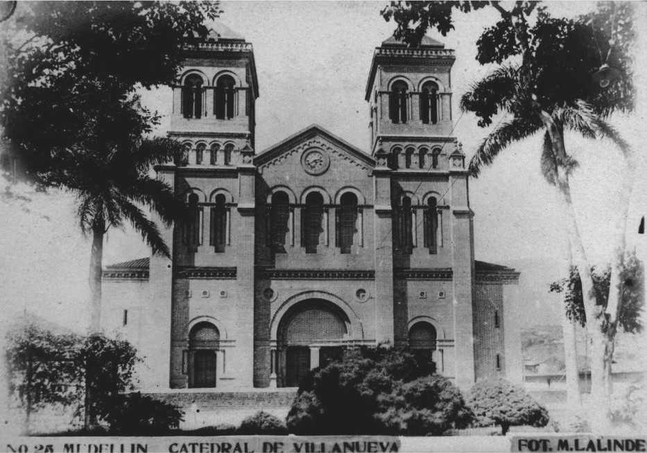 Catedral Metropolitana de Medellín en el año de 1924, fotógrafo:Manuel A. Lalinde.